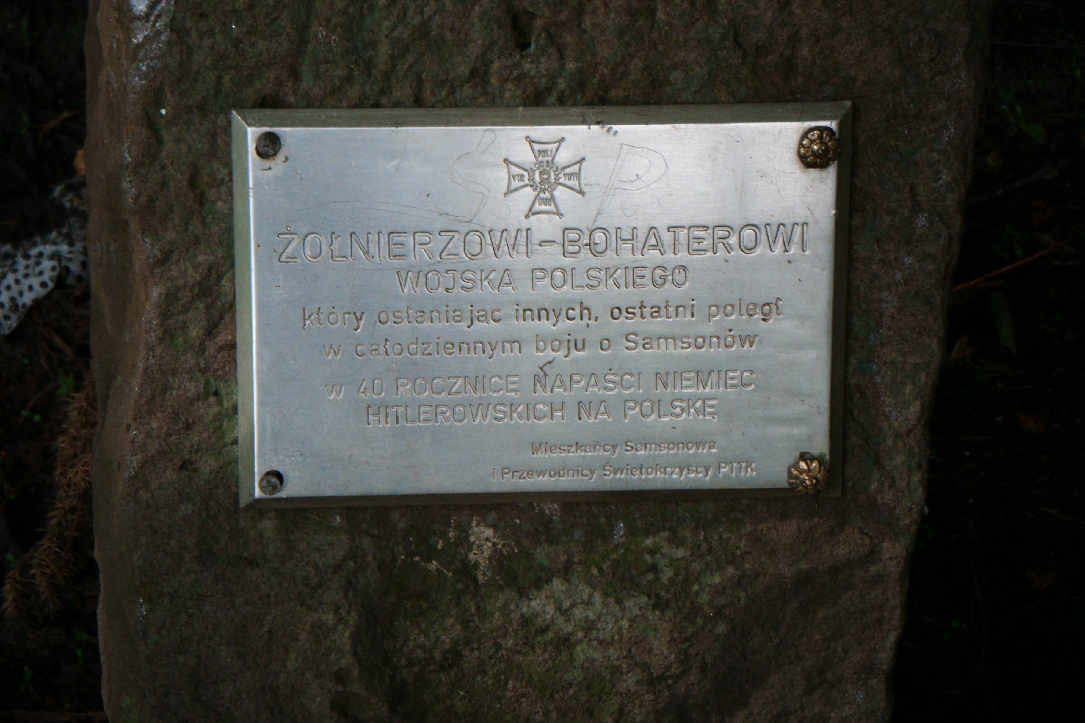 Grób nieznanego żołnierza września 1939 w Samsonowie nie daleko ruin huty "Józef"